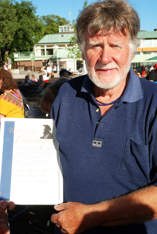 Carl-Anton Axelsson at Taubedagen, Soliden, Stockholm.